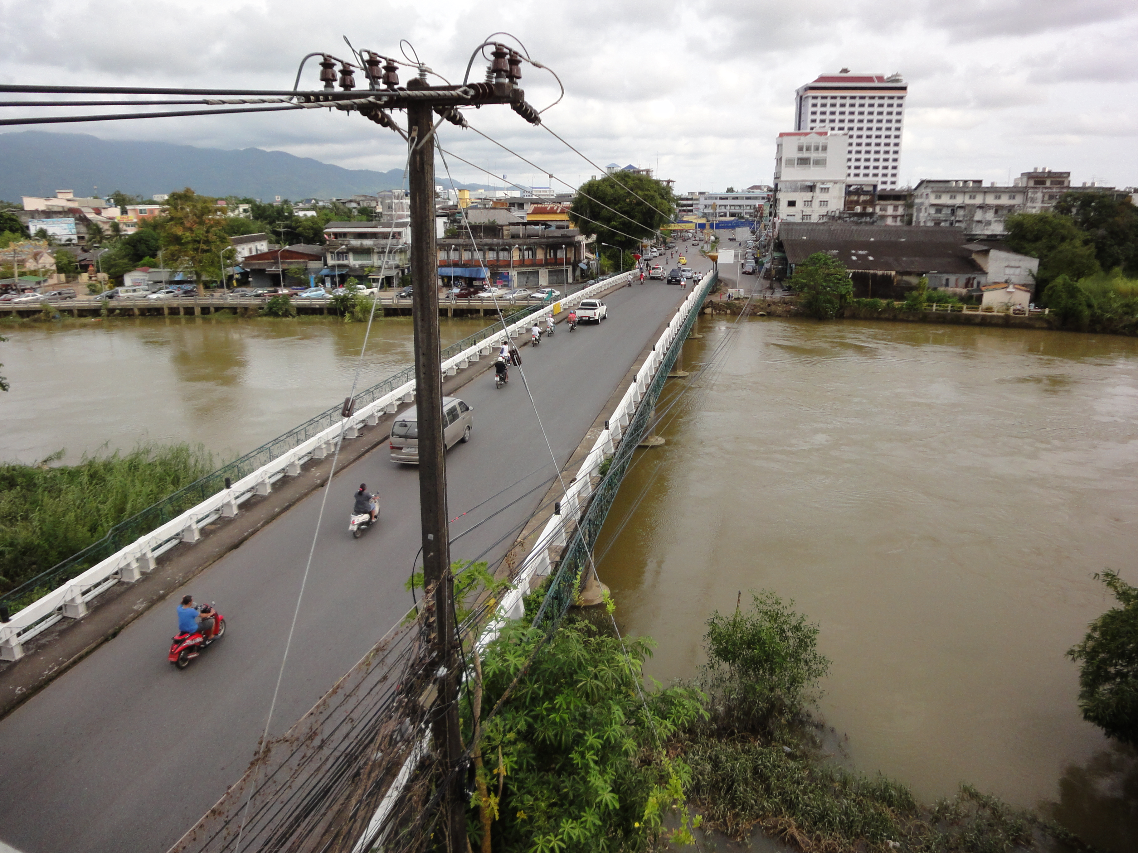 Chanthaburi pont principal en 2010, Teerat Road.